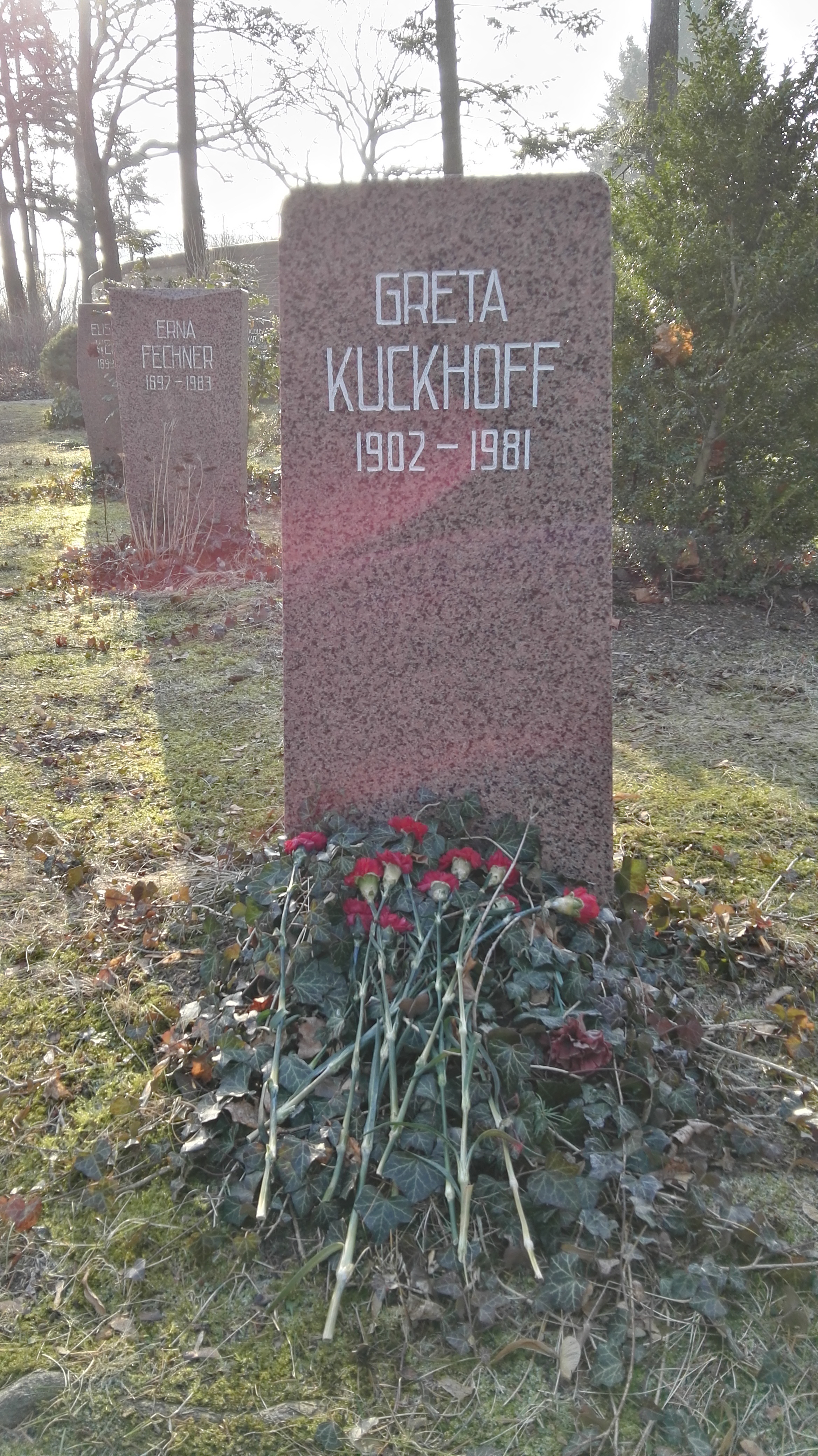 Grab von Greta Kuckhoff in der Grabanlage Pergolenweg auf dem Sozialistenfriedhof des Zentralfriedhofs Friedrichsfelde